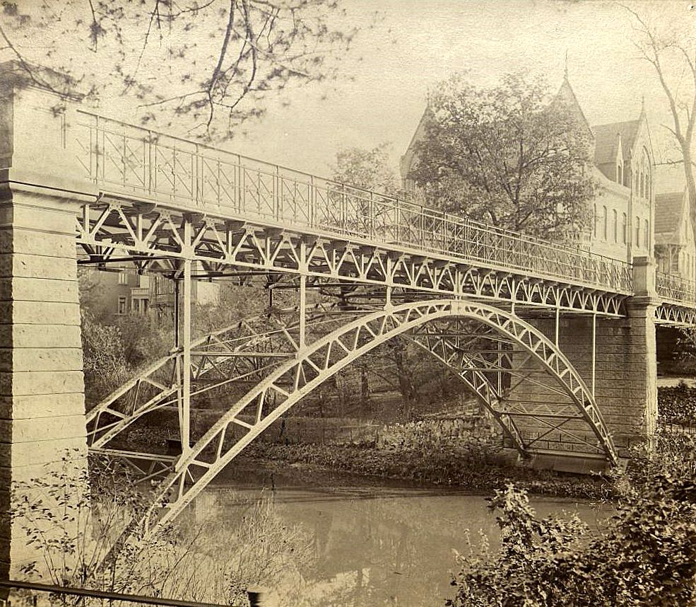 Braunschweig: Die Ottmerbrücke von 1884 über die Oker.